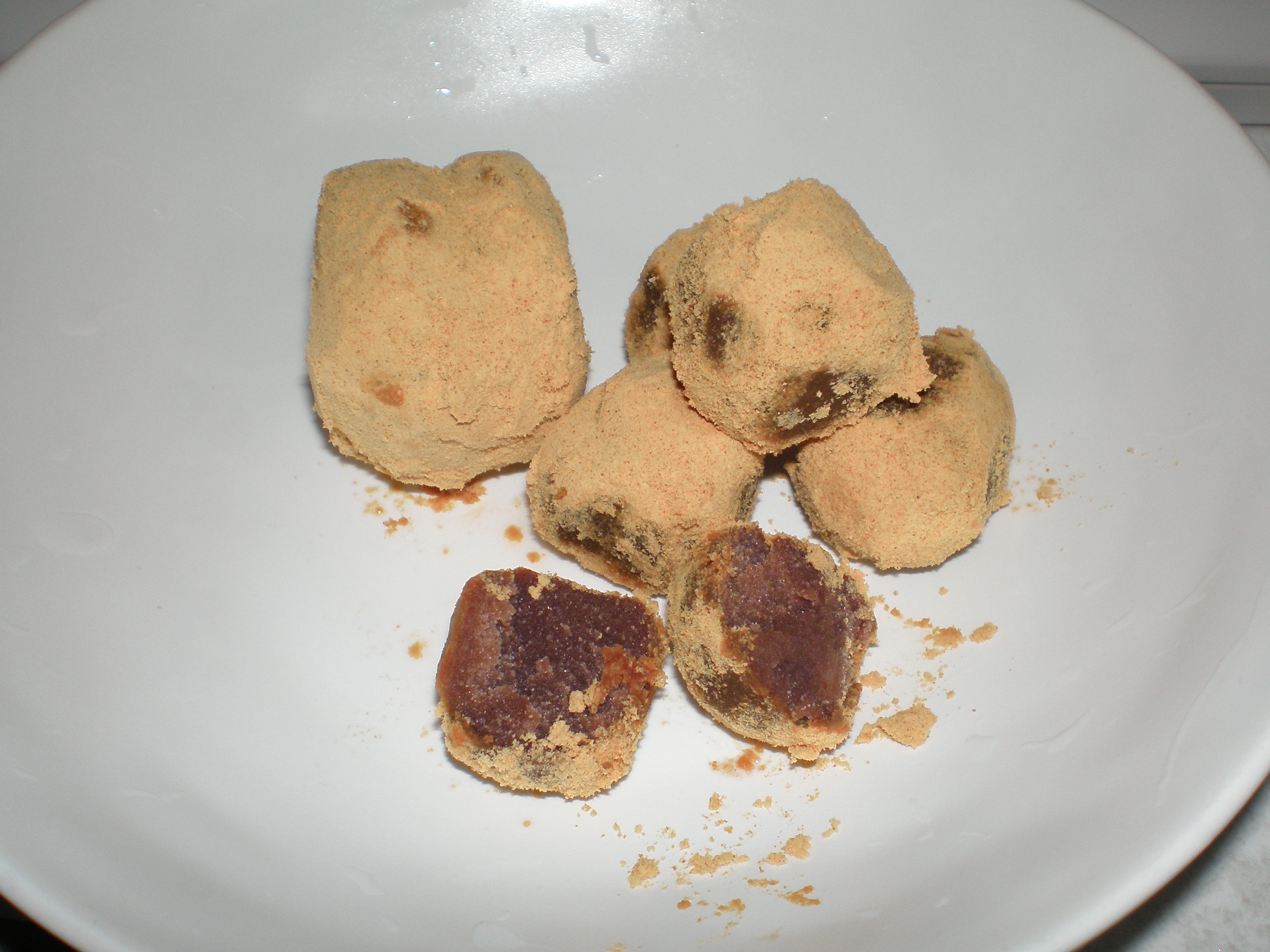 Anko dama (Red bean paste ball)